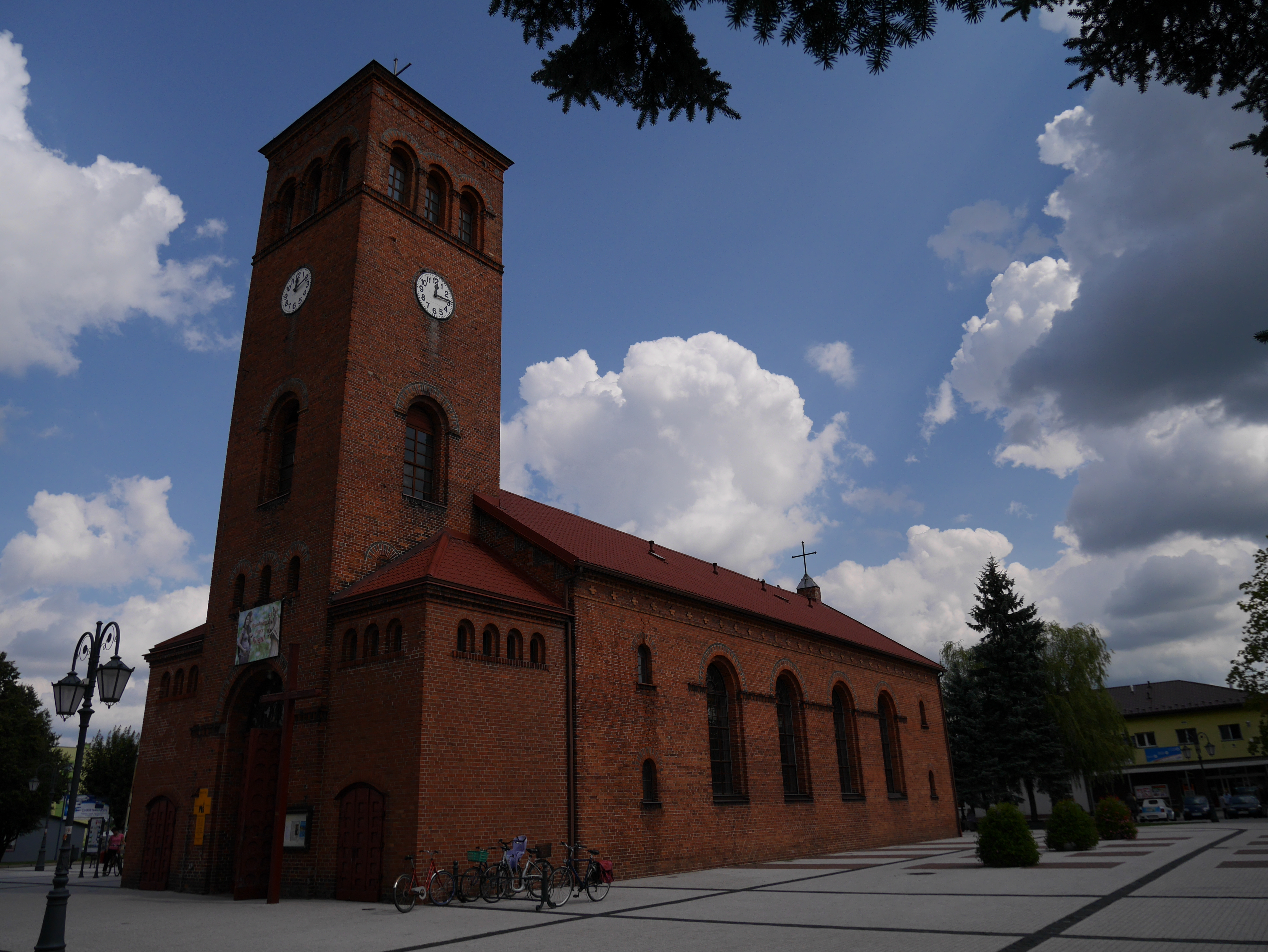 Krajenka, kościół ewangelicki, ob. rzym.-kat. pom. p.w. św. Józefa, 1846-1847